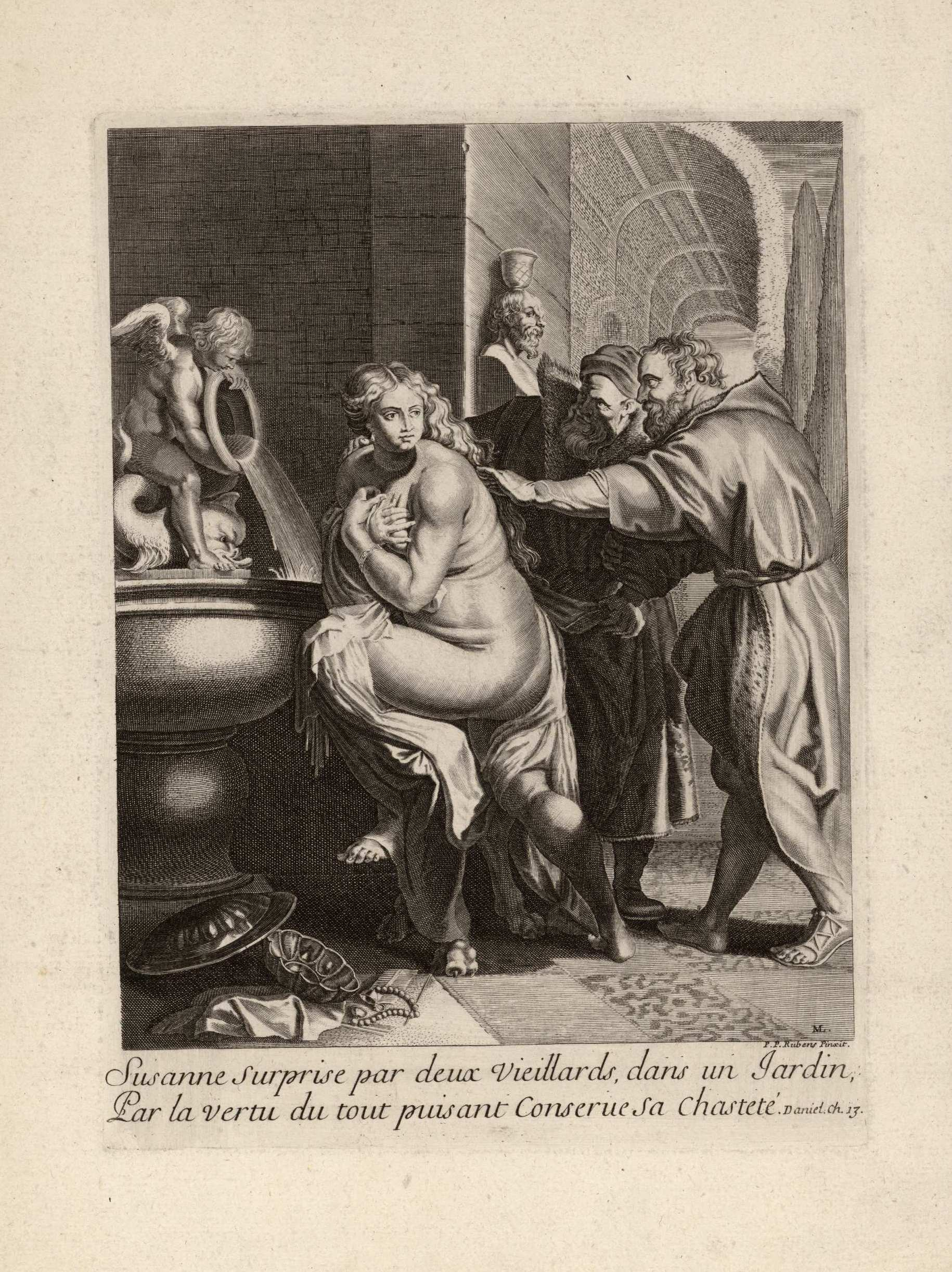 Susana y los viejos, buril de Michel Lasne por pintura de Pedro Pablo Rubens en paradero desconocido. Biblioteca Nacional de España